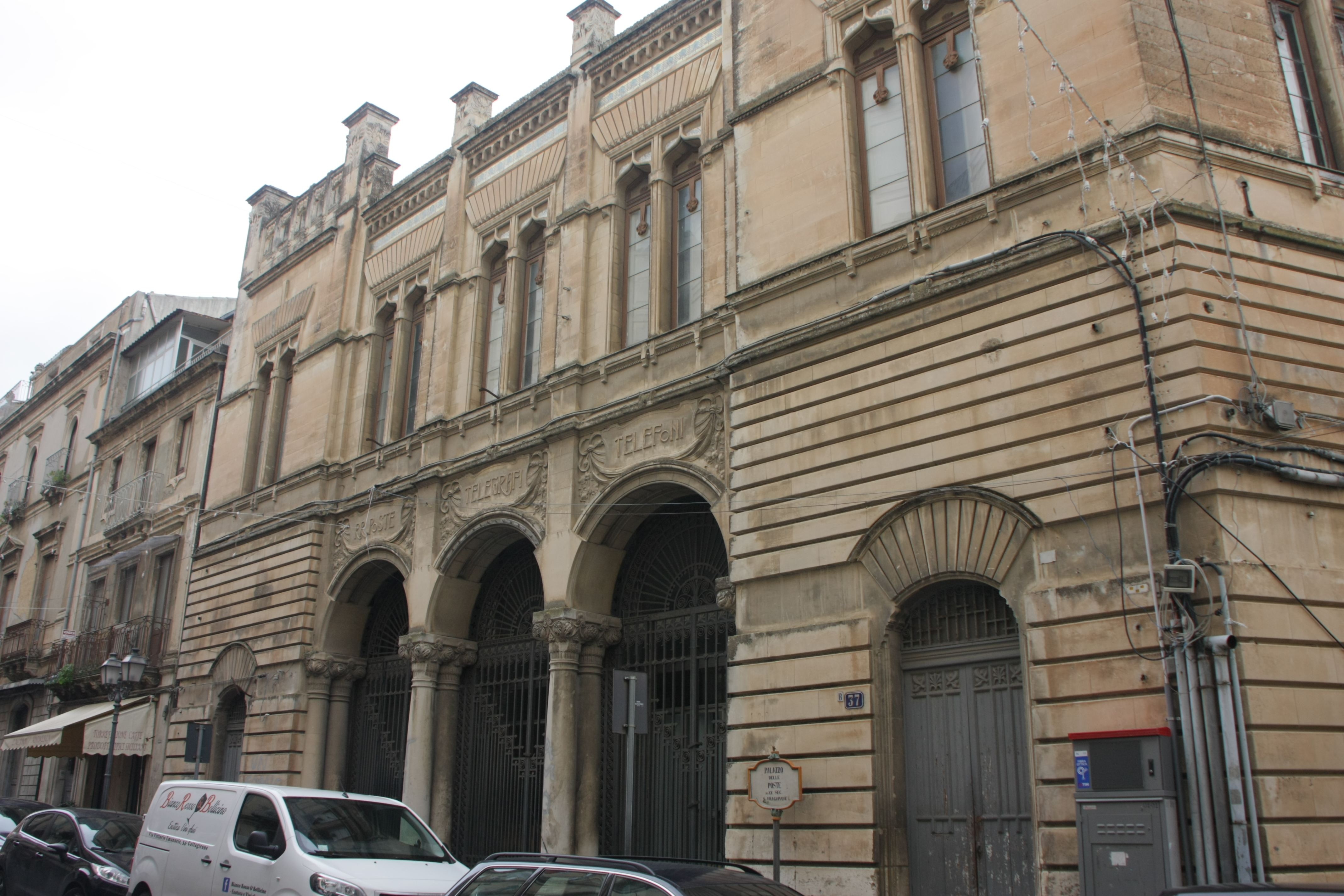 Posta di Caltagirone